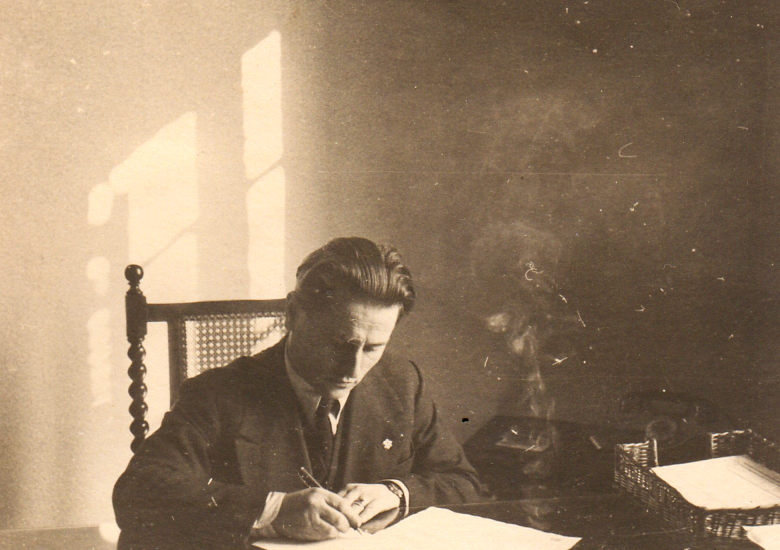 Alberto Vianello nell suo studio a Roma.